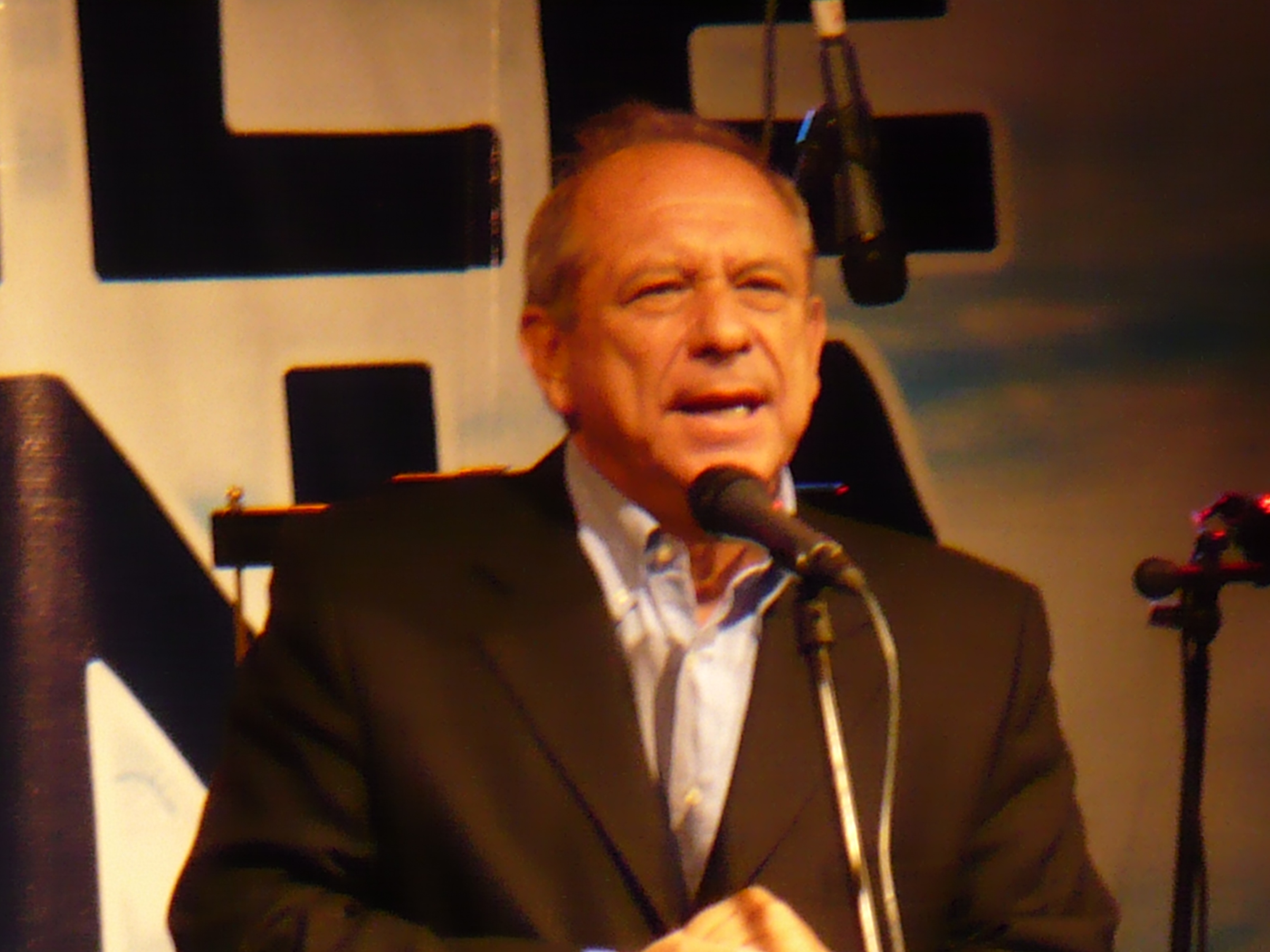 Juan Carlos Latorre el cierre de la precandidatura de Eduardo Frei Ruiz-Tagle en Rancagua, 2009.